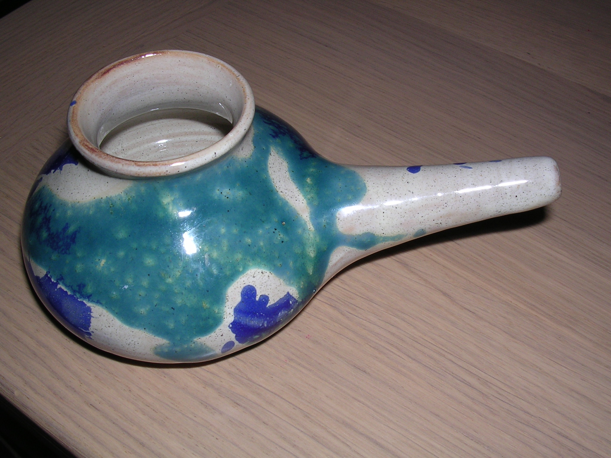 Neti pot